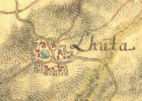 Chocenická Lhota 1750